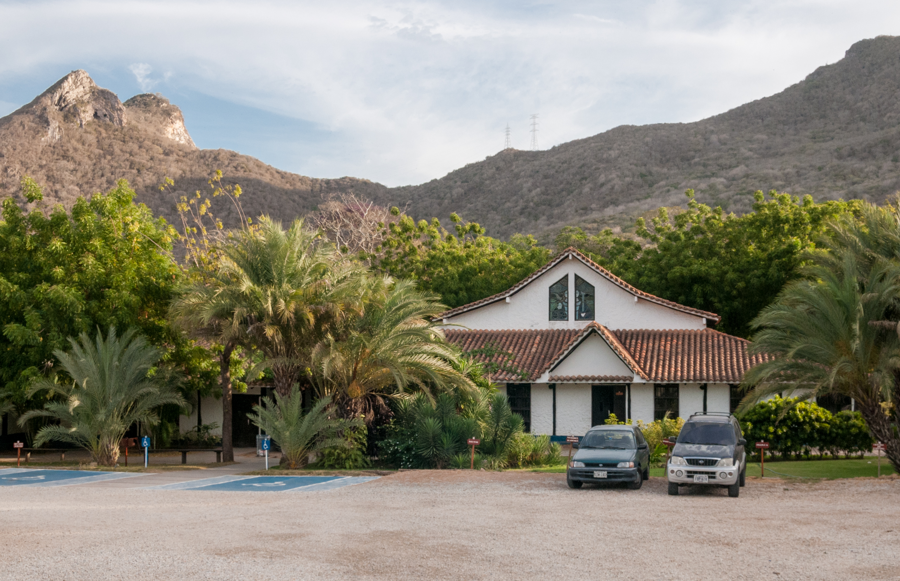 Universidad de Margarita